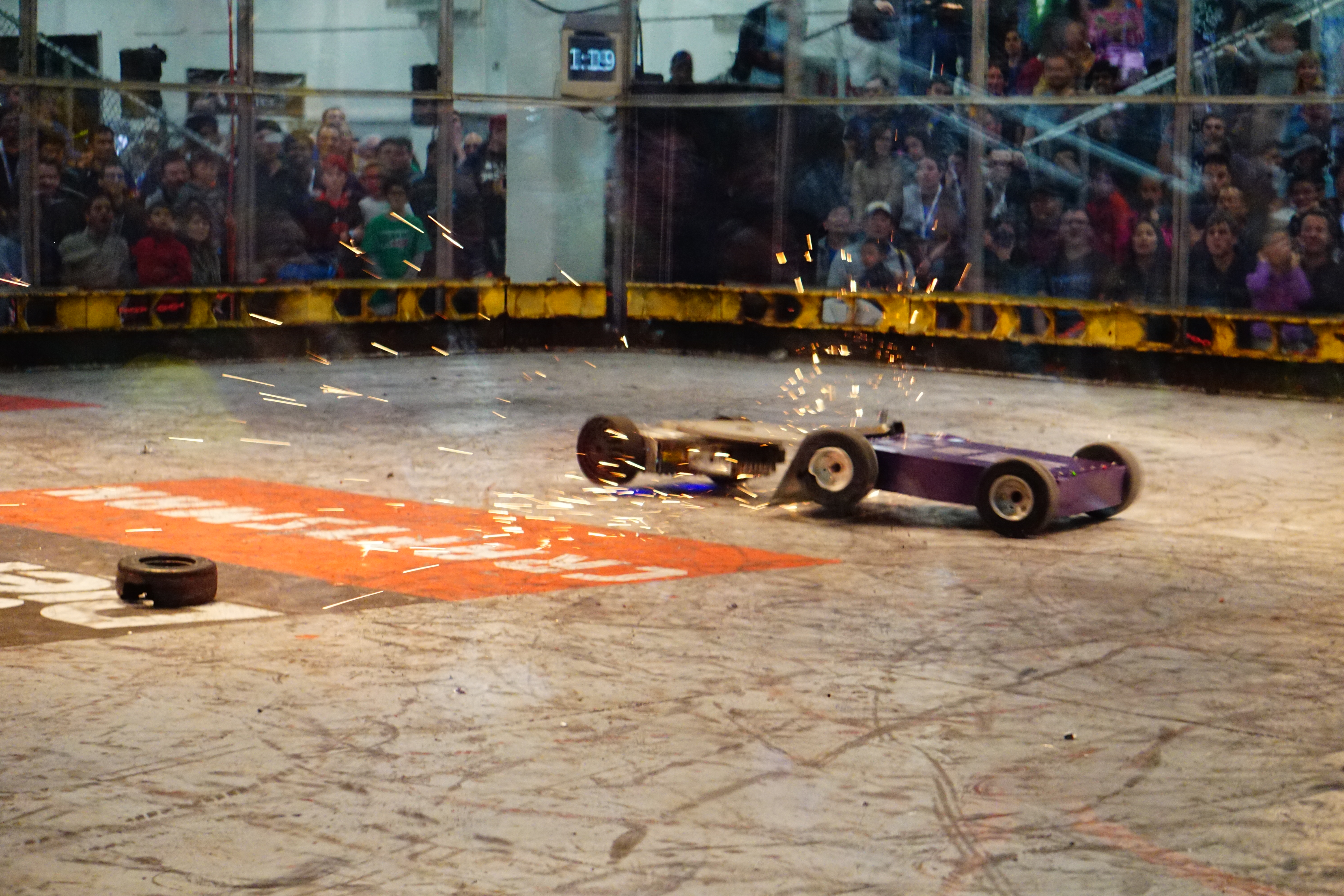 RoboGames2016-Middleweight